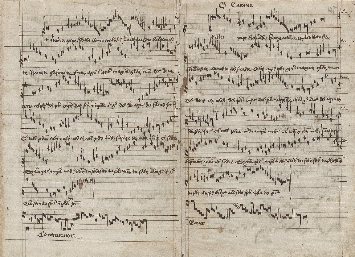 Warsaw, National Library III. 8054 (olim Krasinski 52)